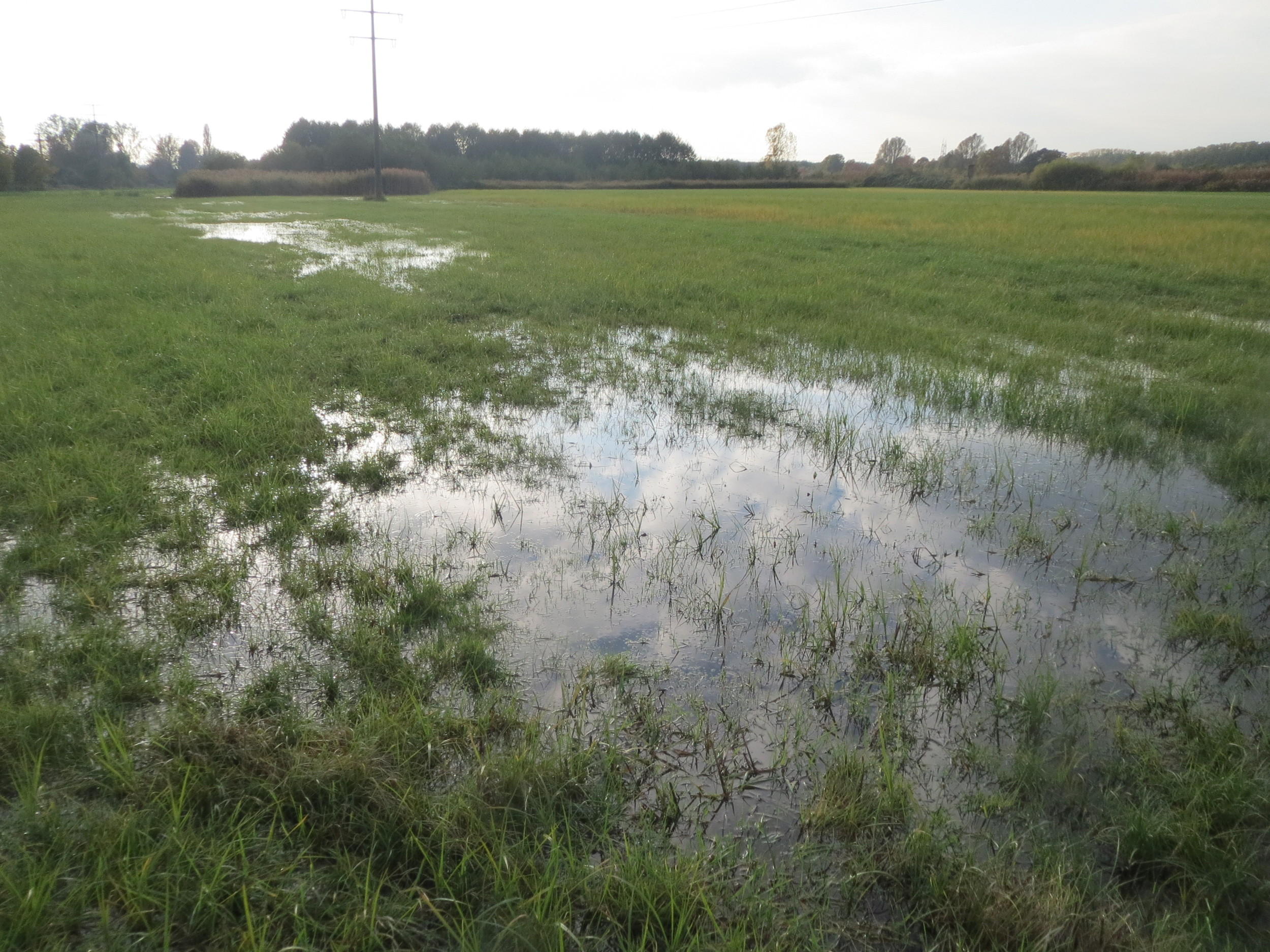 Anmoor in den Horststückern im Hockenheimer Rheinbogen - überwiegend wachsen hier Seggen (Carex)